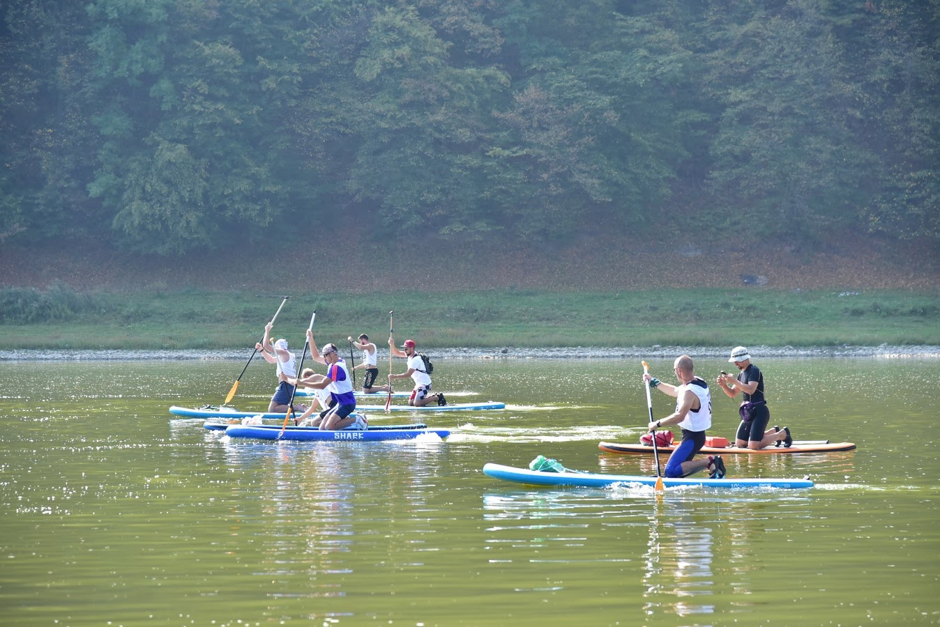 Веслувальний етап на SUP-дошках на Дністрі